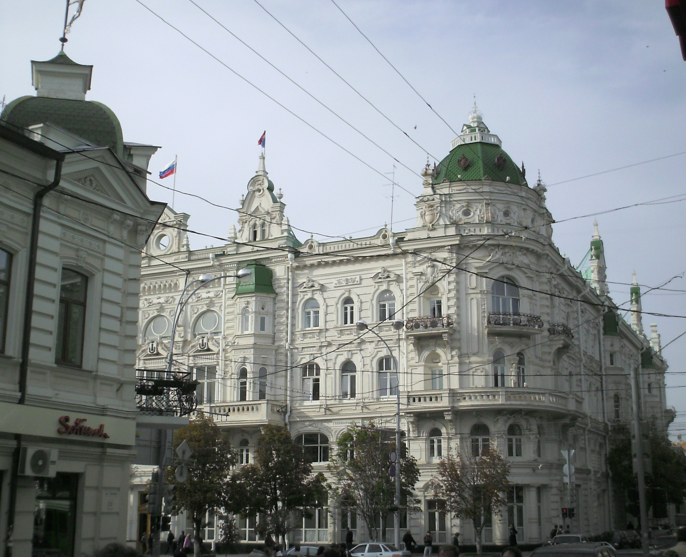 Ростов на Дону